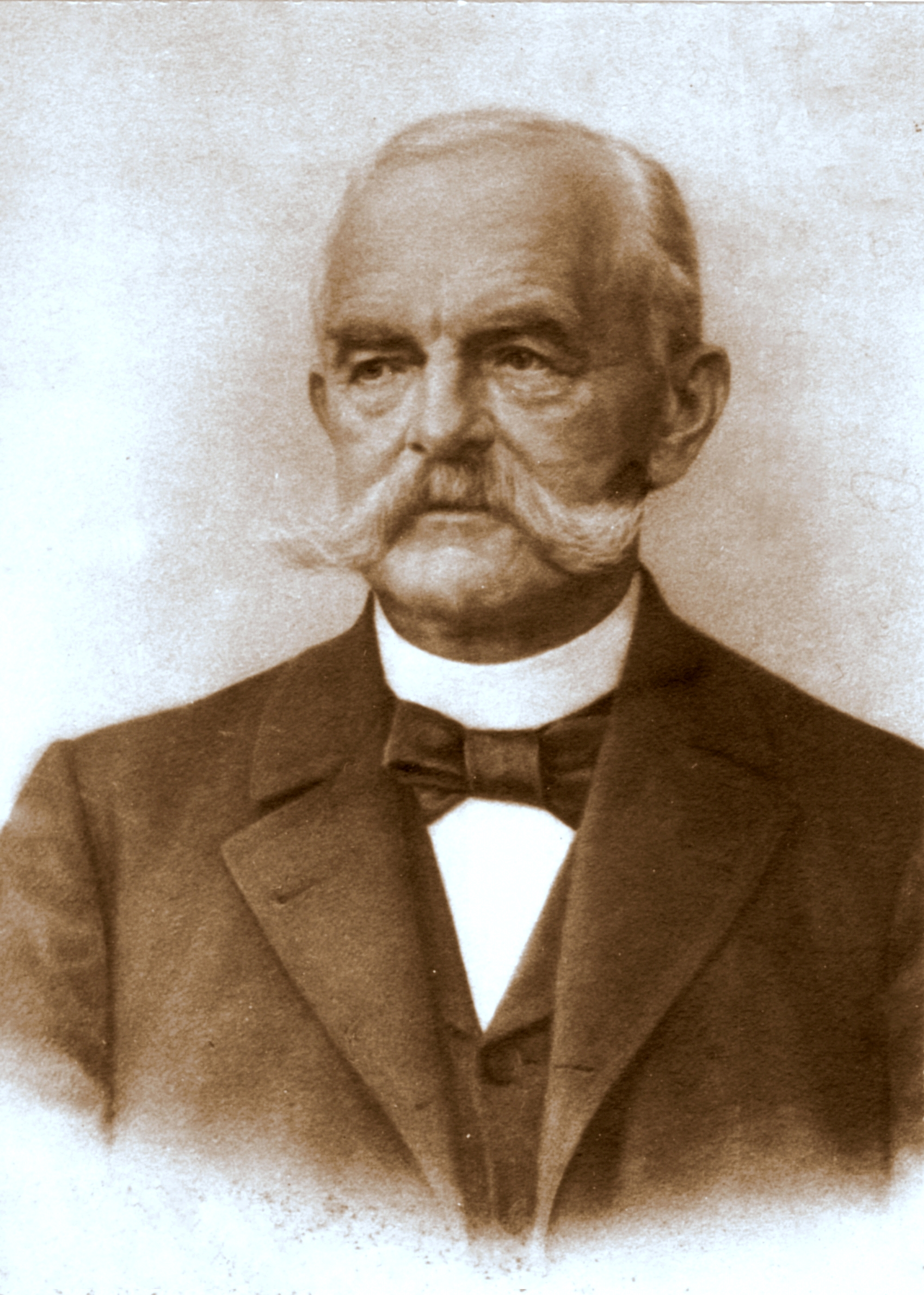 Carl Wilhelm Julius Appelius, Dr. jur. h.c., Geheimer Großherzogl. Sächsischer Justizrat, Landesgerichtspräsident und Landtagspräsident im Großherzogtum Sachsen-Weimar-Eisenach, Präsident der Landessynode (* 20.09.1826 Eisenach, + 19.10.1900 Eisenach)